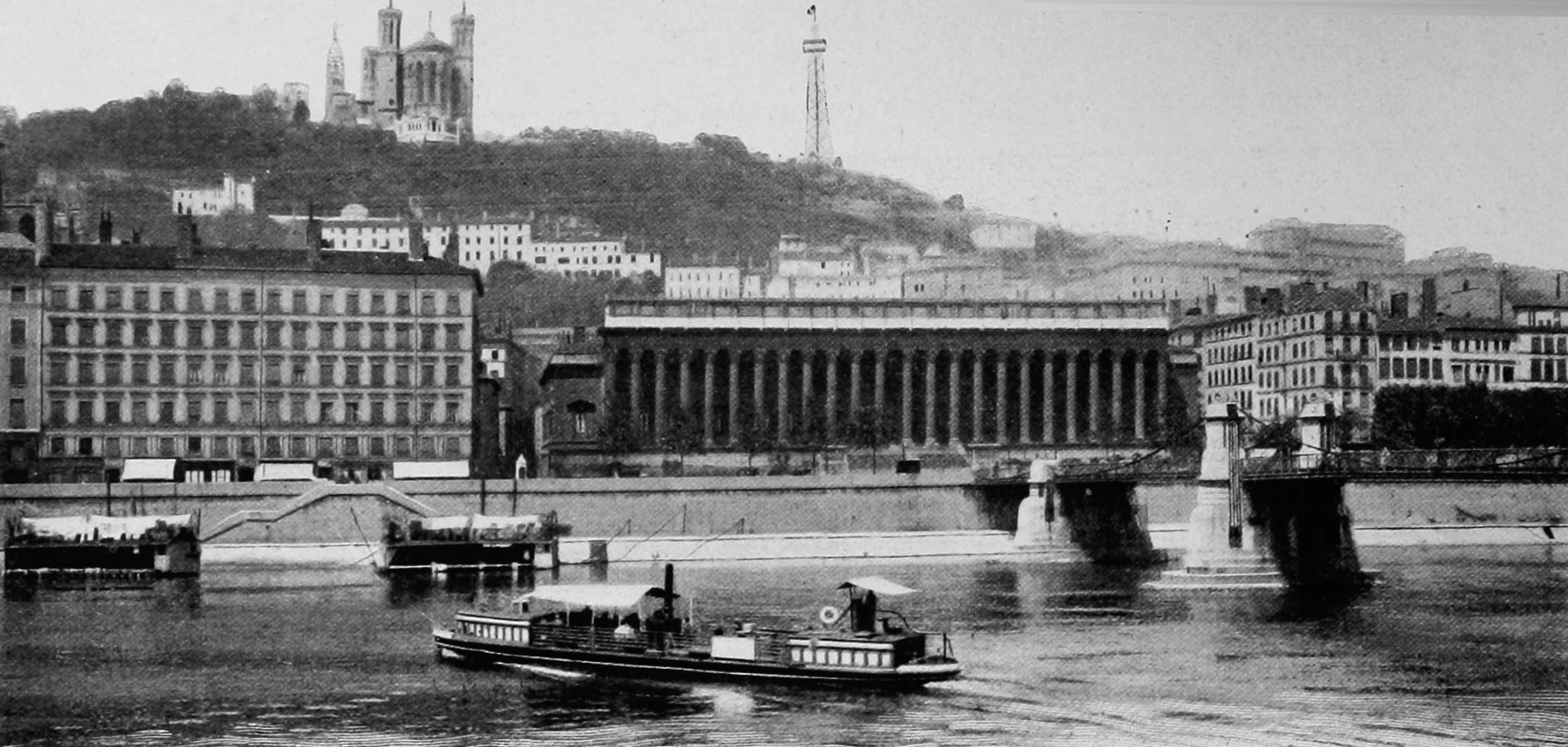 Dictionnaire illustré des communes du département du Rhône. Tome 2 / par MM. E. de Rolland et D. Clouzet.